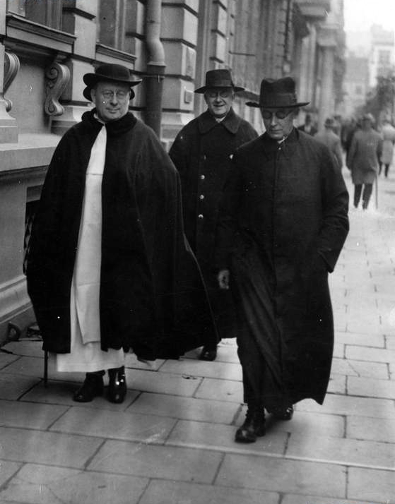 Od lewej Martin Stanislas Gillet Jacek Woroniecki i Henryk Jakubca.